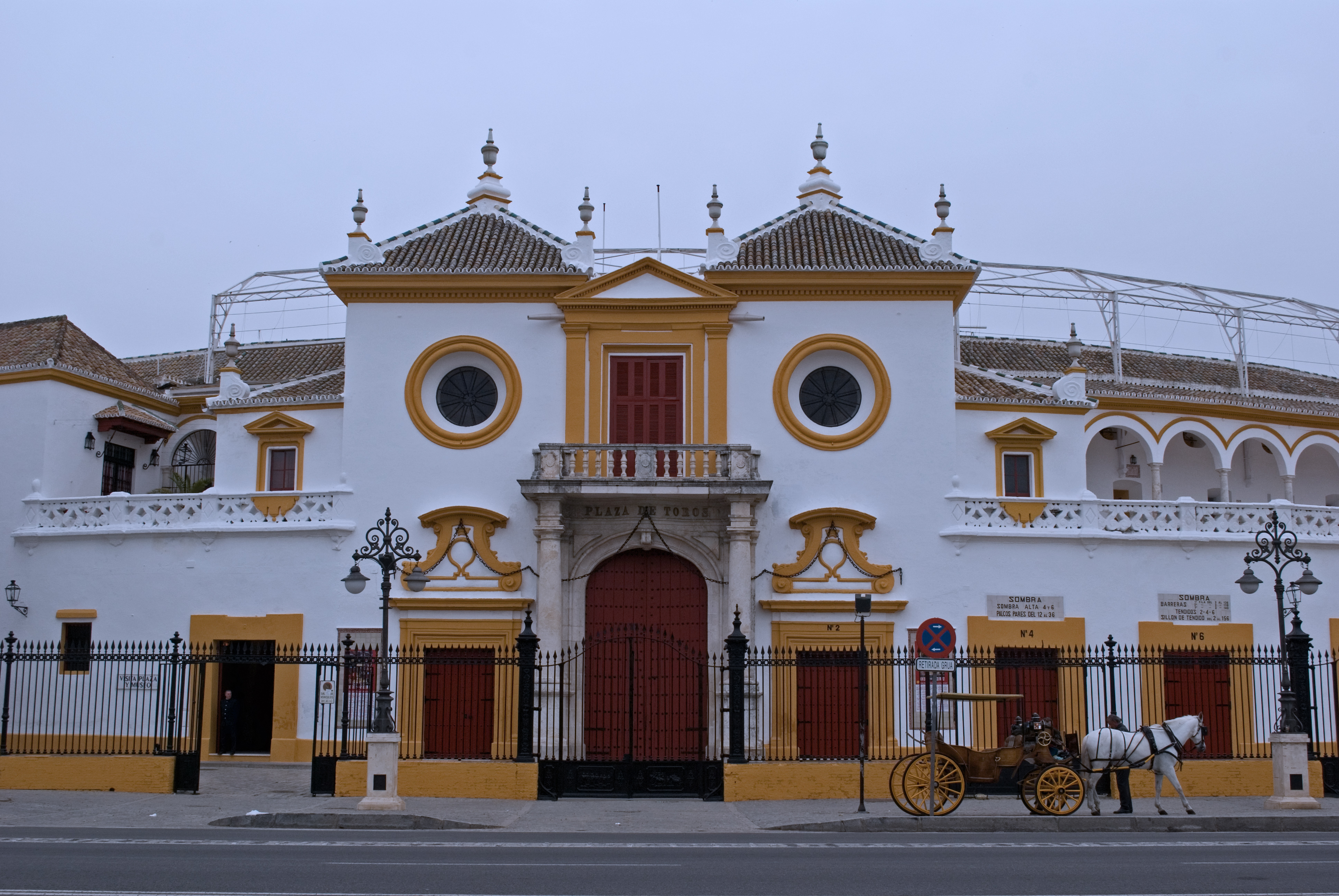 Plaza de Toros de la Maestranza, Sevilla